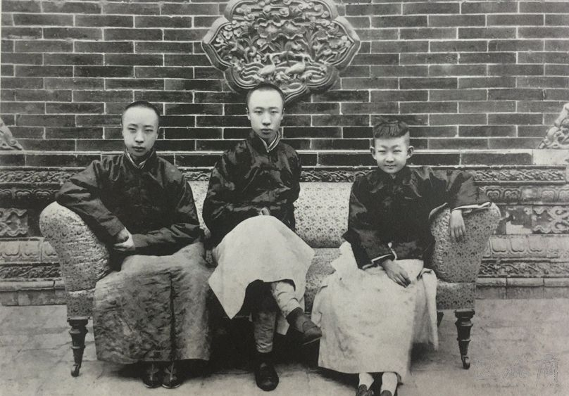 中文（中国大陆）: 溥杰(左)，溥仪，润麒(右)